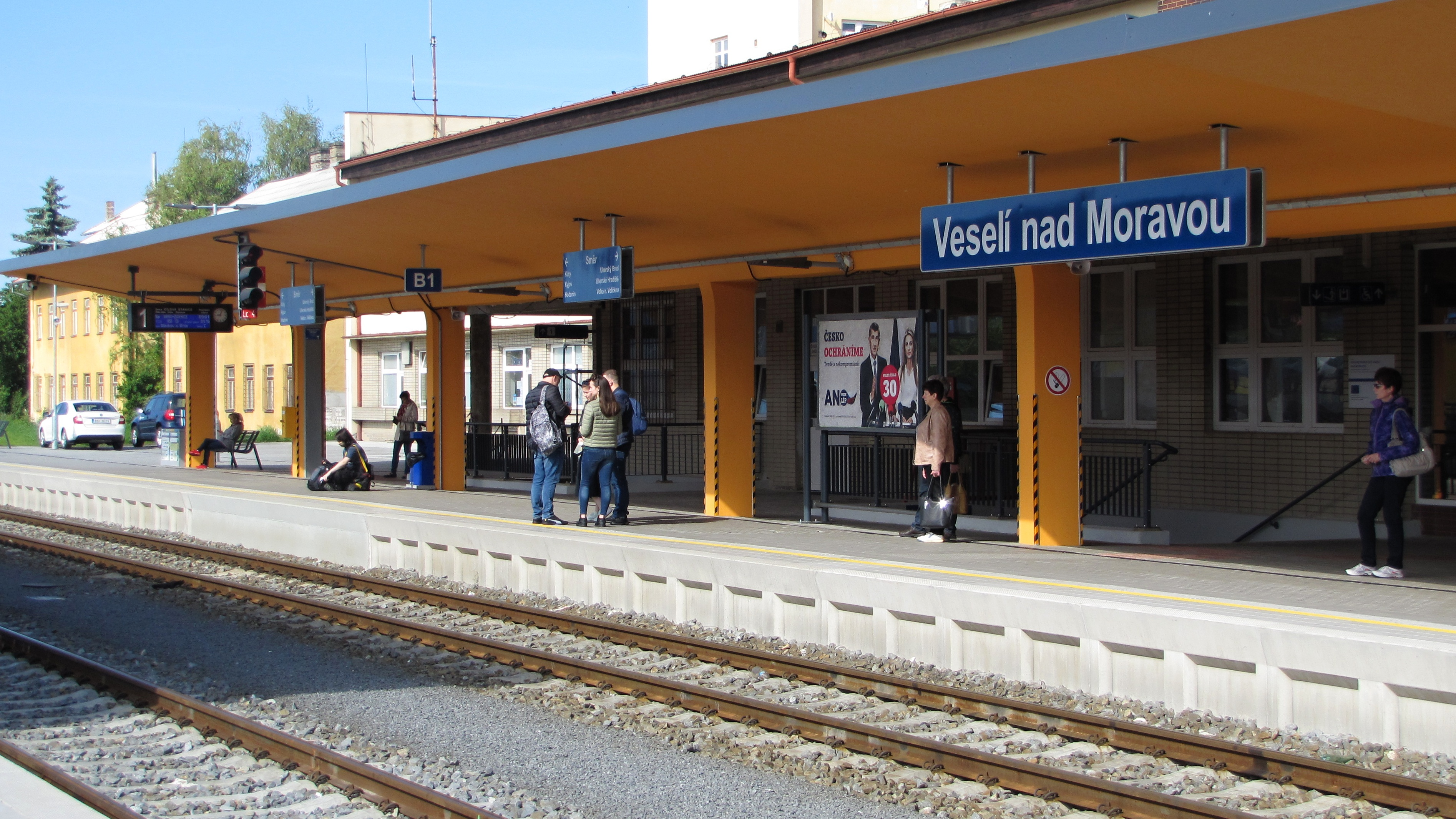 Železniční stanice Veselí nad Moravou